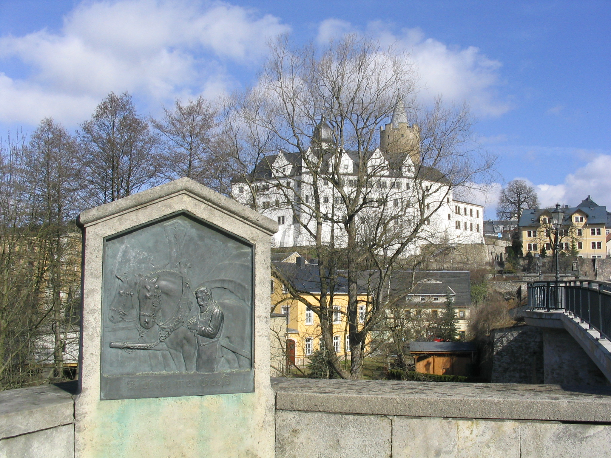 Denkmal an der Zschopaubrücke an der alten Salzstraße (Böhmischer Steig), Inschrift "Zschap mei Geeß" (Erzgebirgisch: Zschopau, mein Jesus) Im Hintergrund Schloß wildeck Aufgenommen am 15.04.2006 von Dr. Hagen Graebner